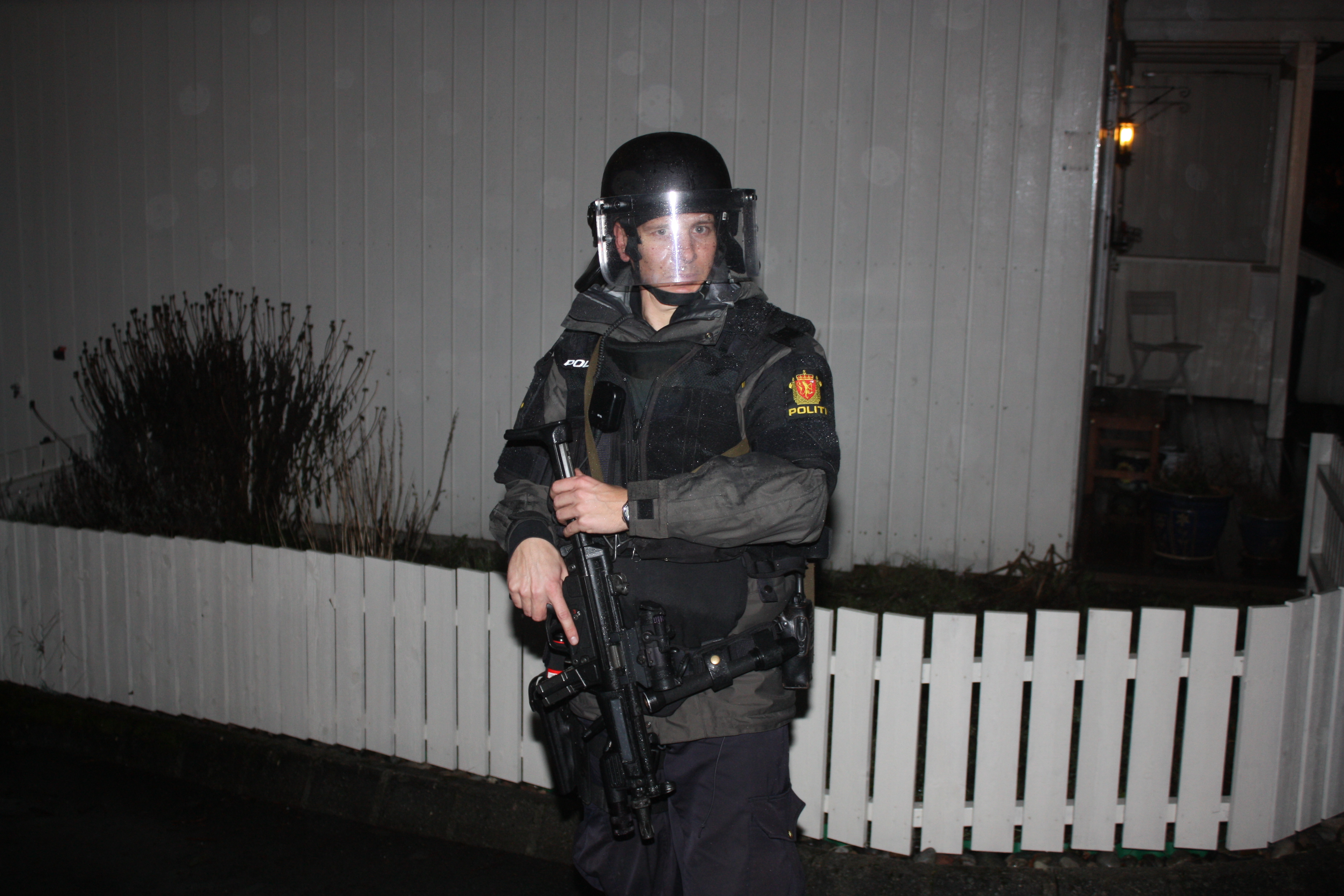 Bevæpnet norsk politi med MP-5 på Hundvåg utenfor Stavanger.